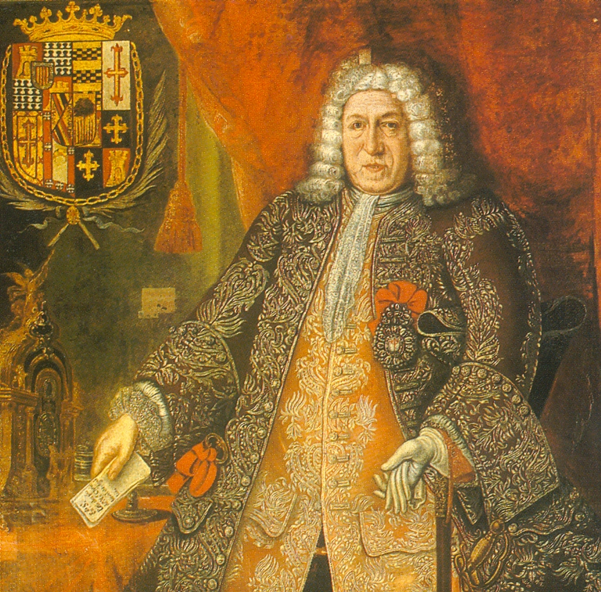 detail